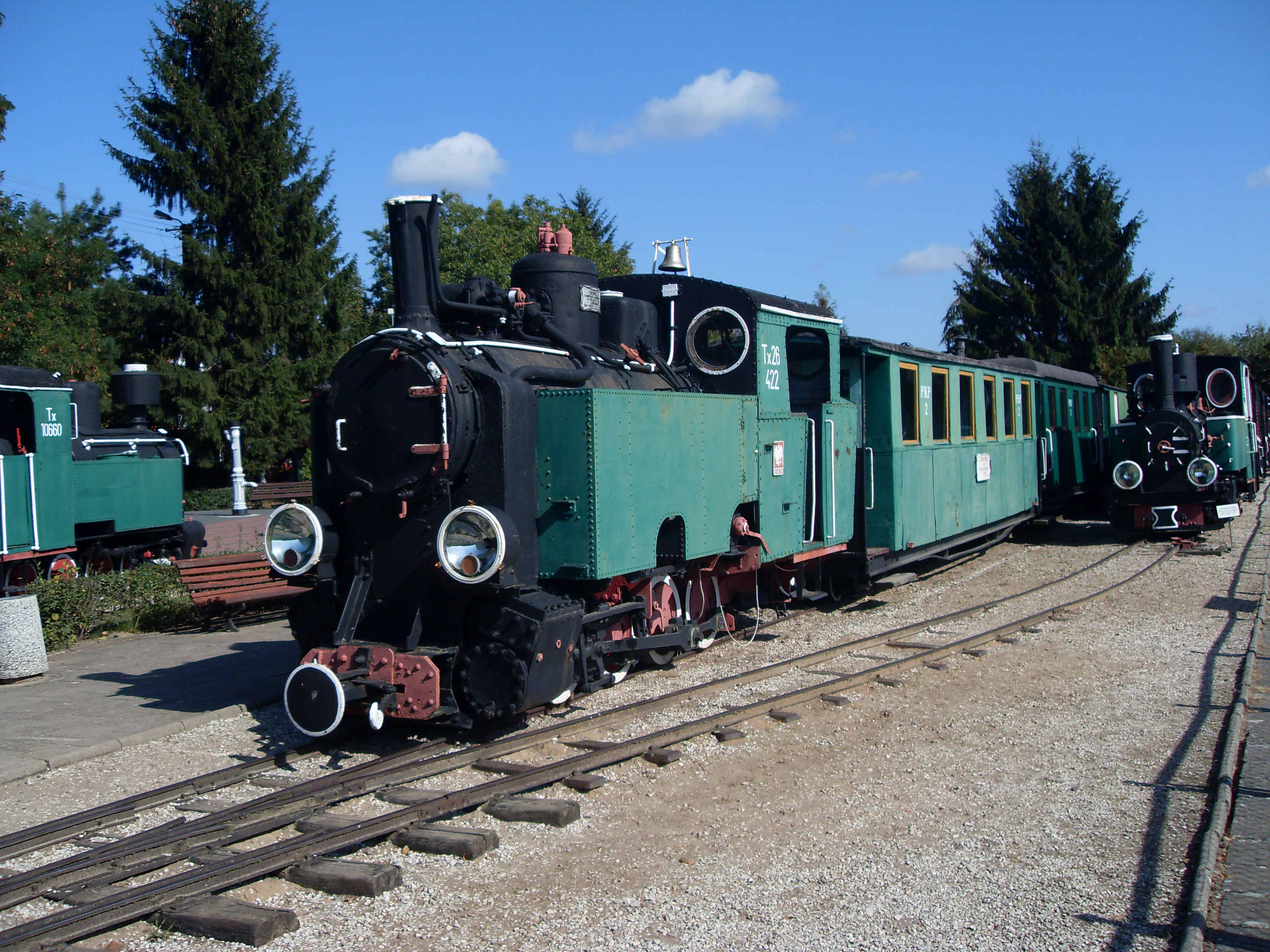 Parowóz Tx26 - 422. Pierwsza Fabryka Lokomotyw w Polsce. Chrzanów 1928